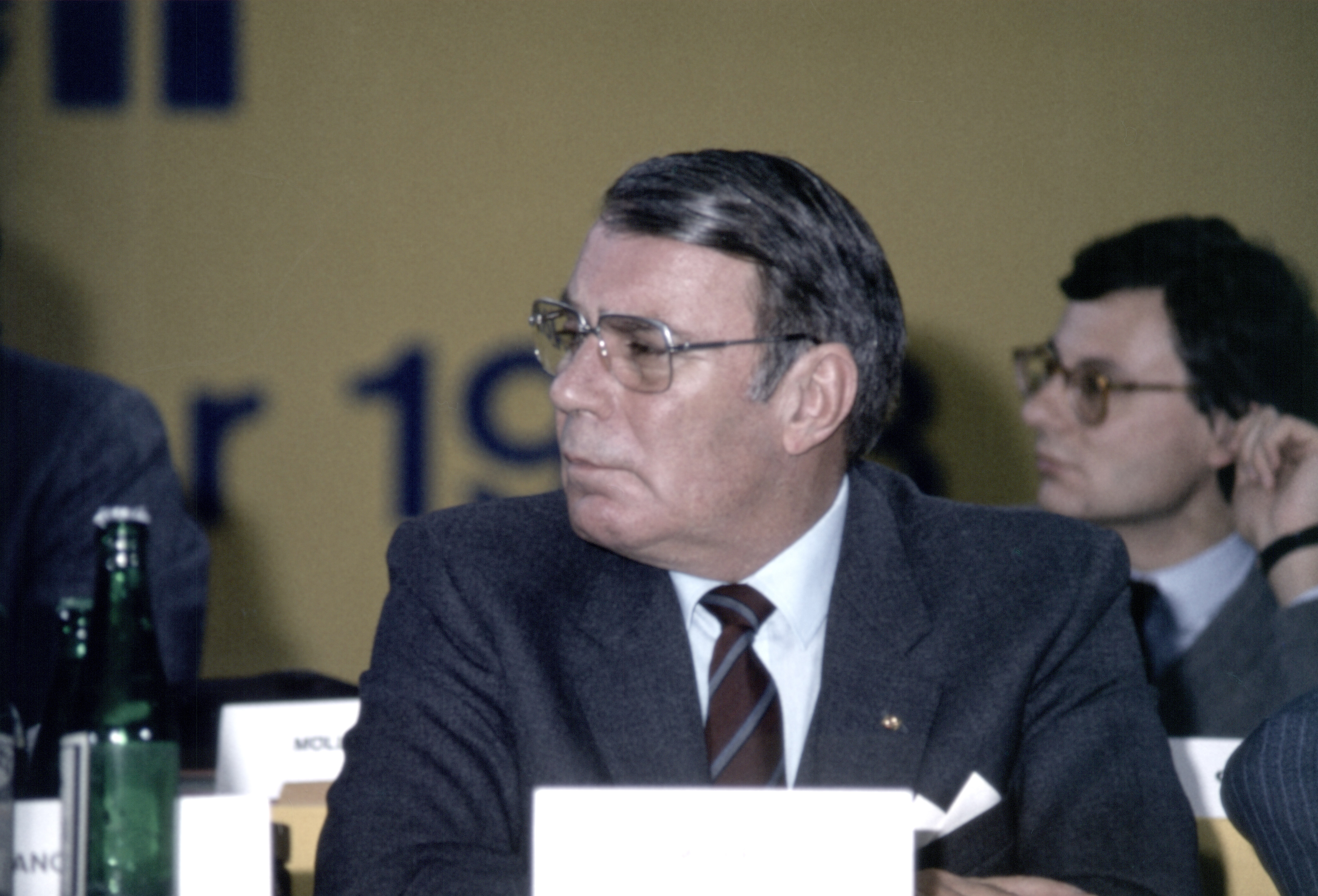 Den außerordentlichen Bundesparteitag 1983 hielt die FDP am 29. und 30. Januar 1983 in der Stadthalle in Freiburg im Breisgau ab. Es handelte sich um den 8. außerordentlichen Bundesparteitag der FDP in der Bundesrepublik Deutschland.